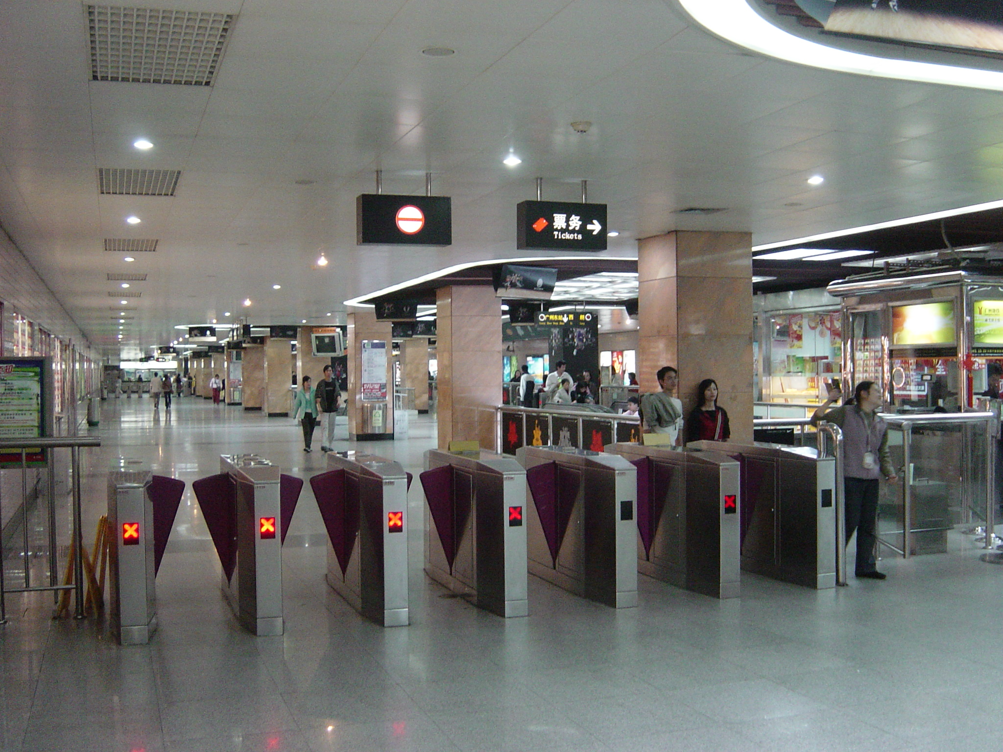 广州地铁一号线体育中心站站厅及出入闸机 本图片由上载者User:老火豆沙煲于2006年1月1日拍摄